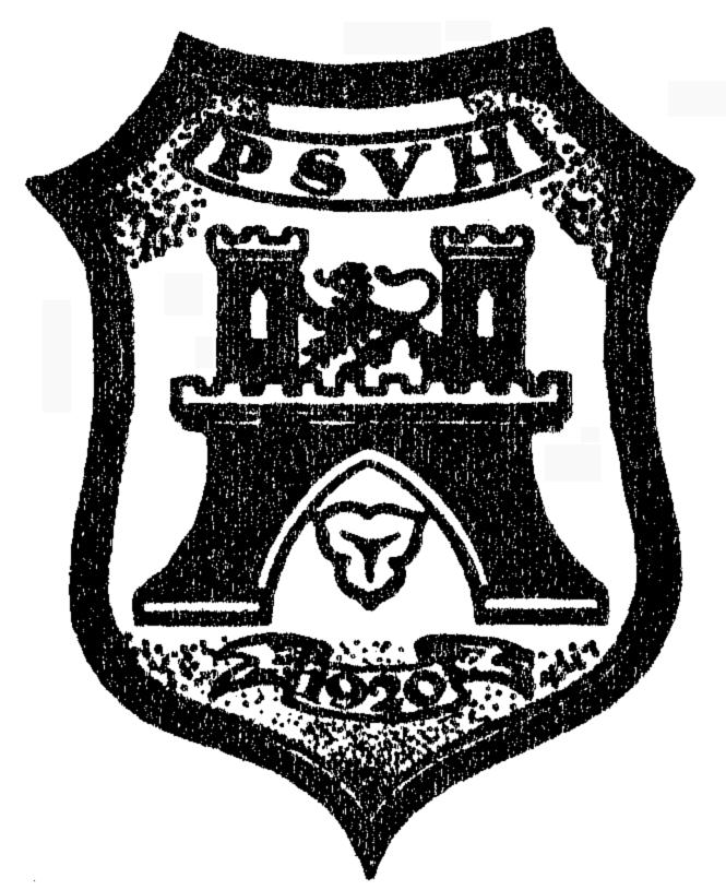 Logo des Polizei-Sportvereins Hannover von 1927